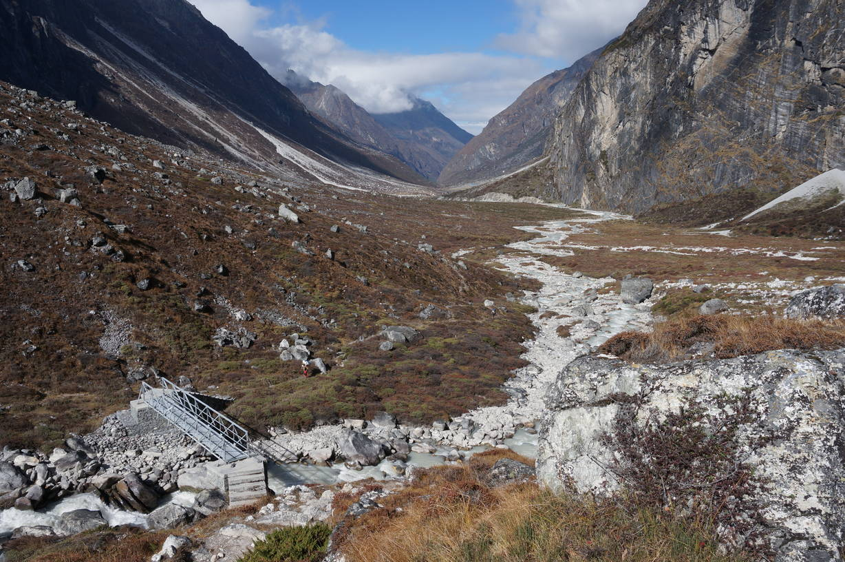 oberster Teil des Rolwalingtals mit Blick vom Tsho Rolpha See zurück nach Na, Rolwaling Himal, Nepal, Himalaya